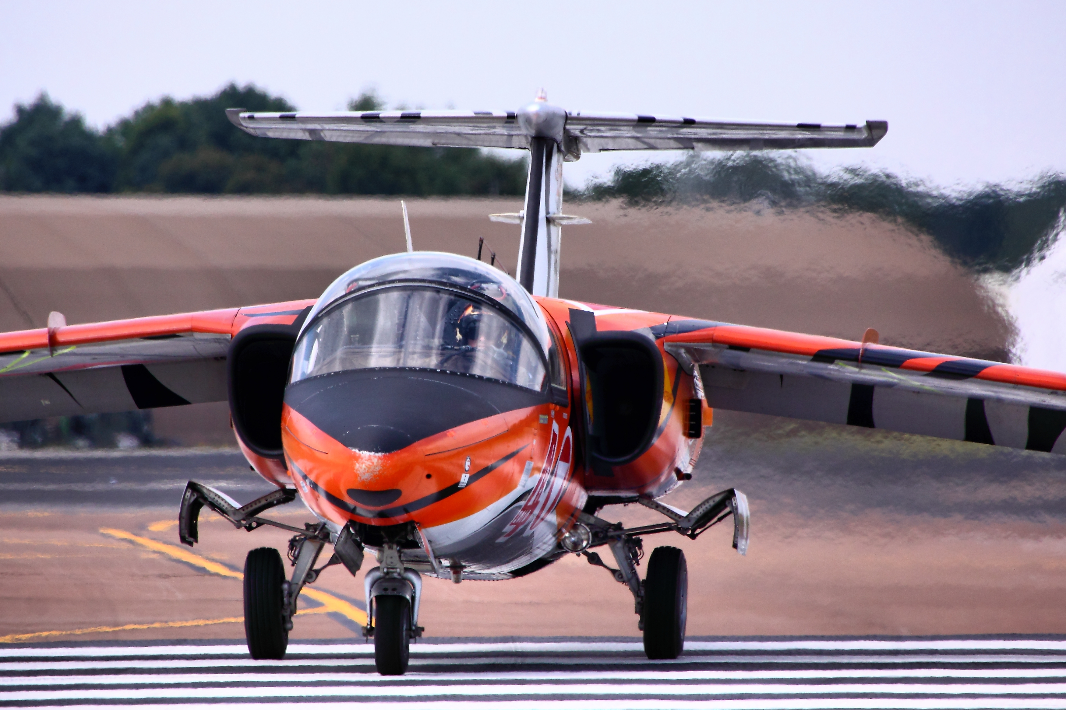 Saab J105 - RIAT 2011